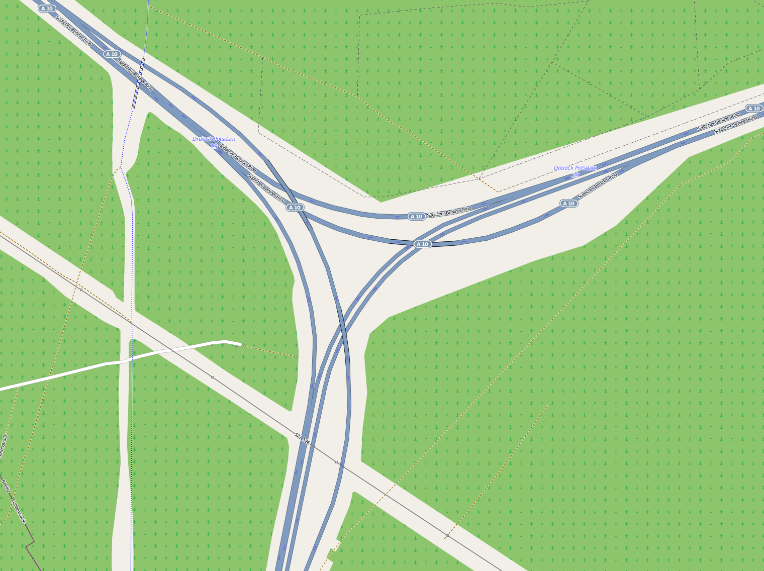 Lage des Autobahndreiecks Potsdam (A10/A9) bei Potsdam.